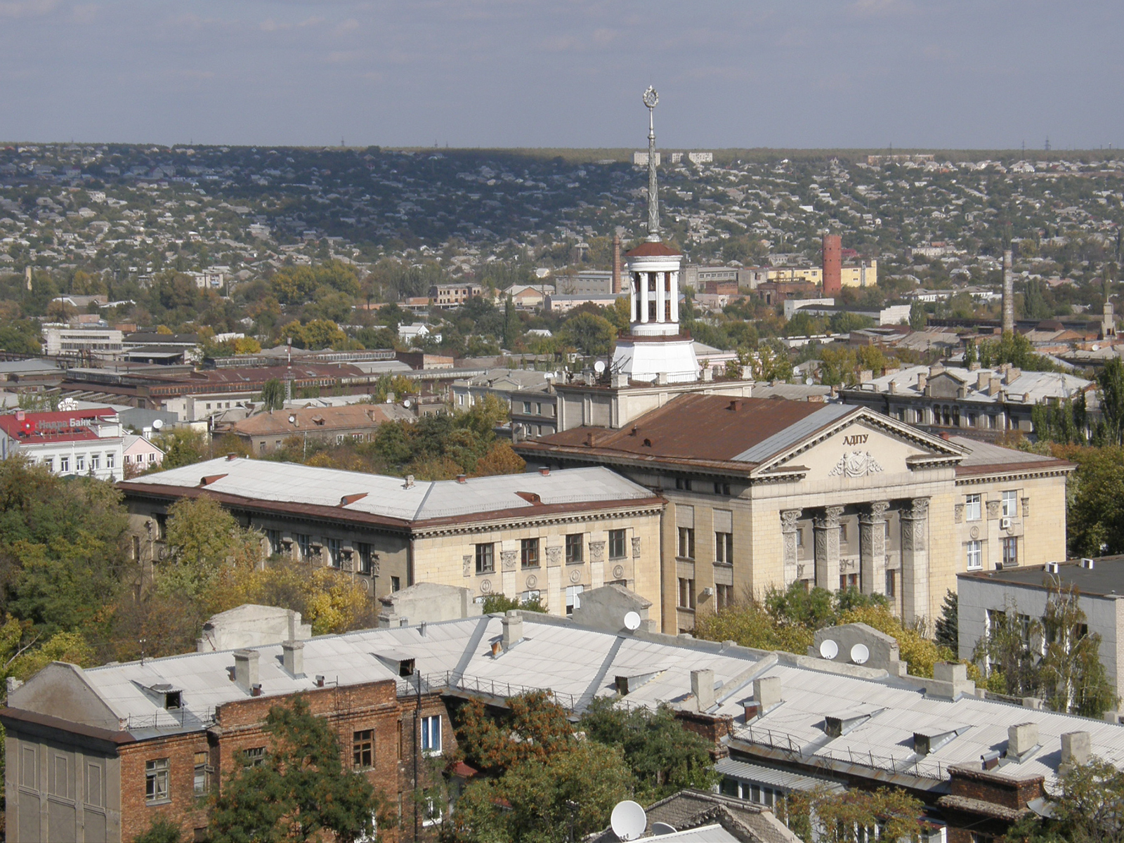 Луганск